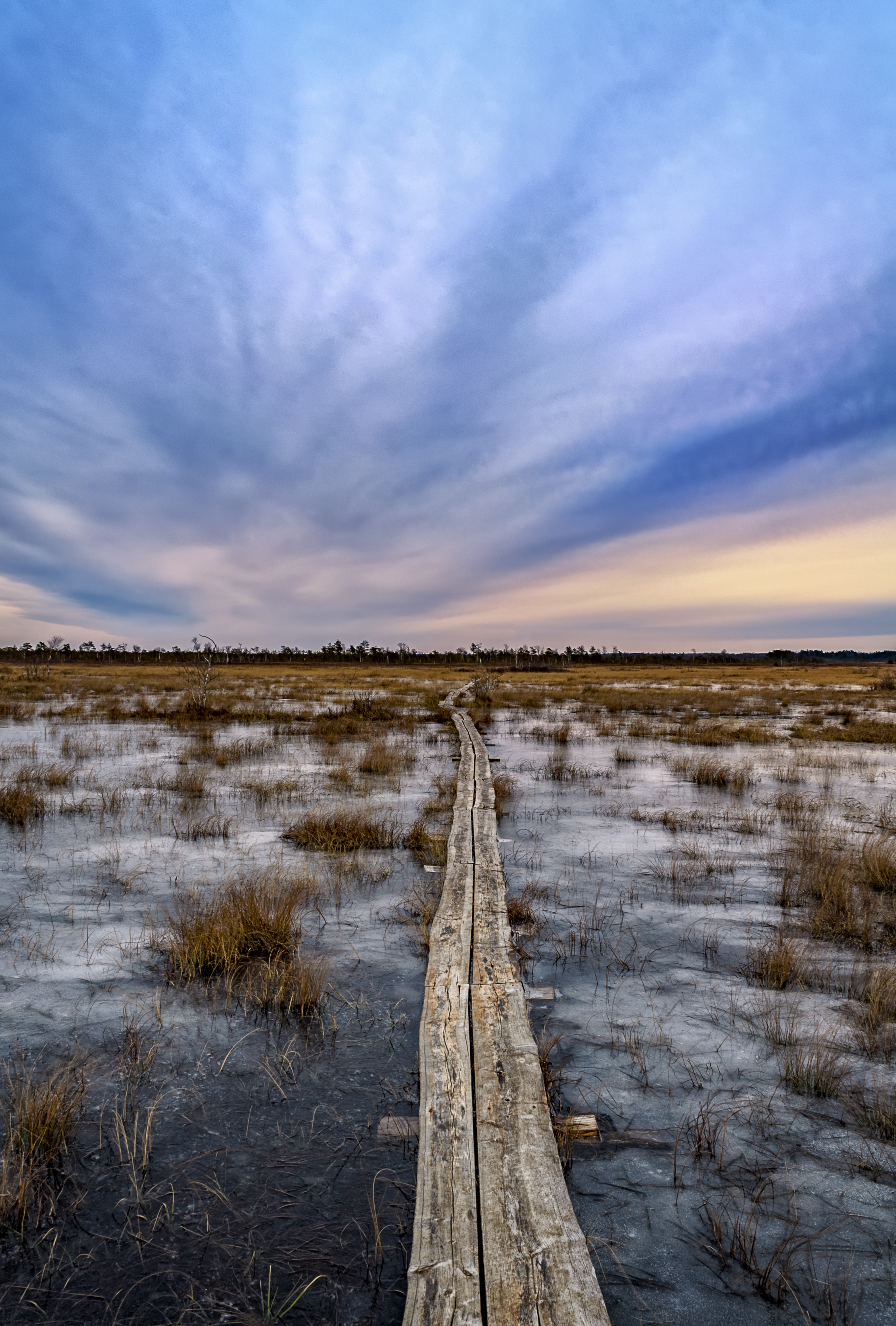 Tuhu soo matkarada